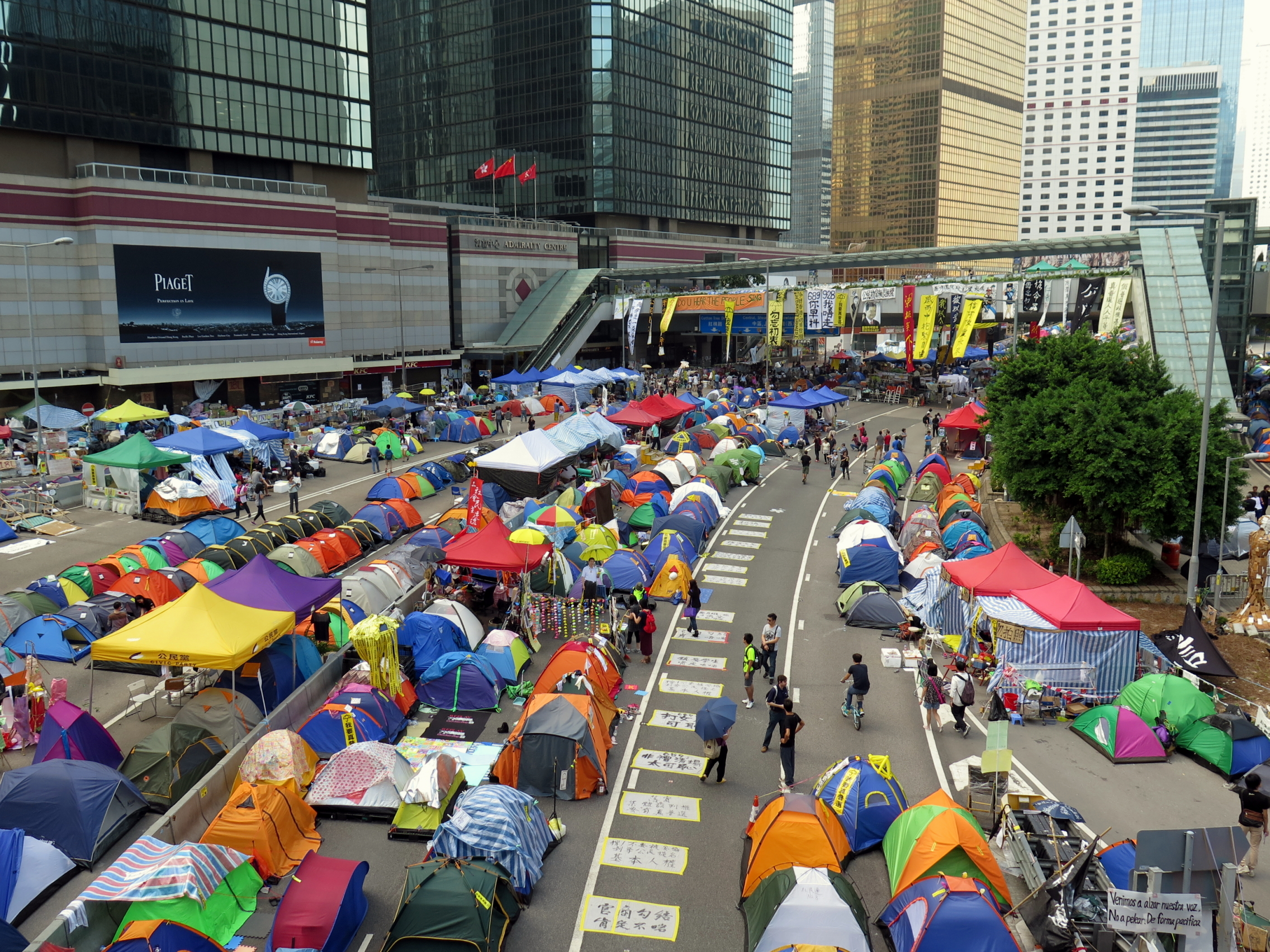 Harcourt Road under Umbrella Movement